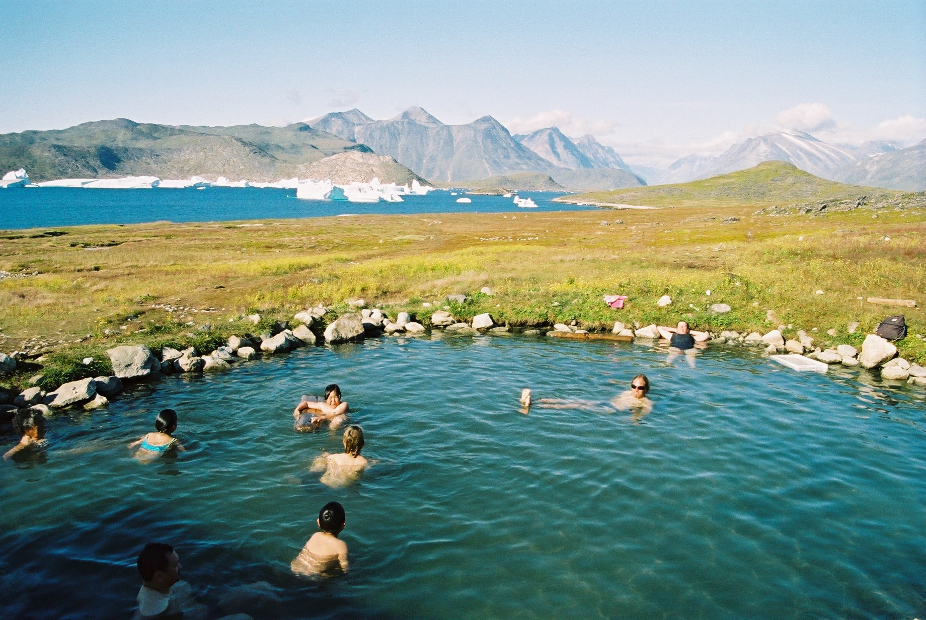 Uunartoq